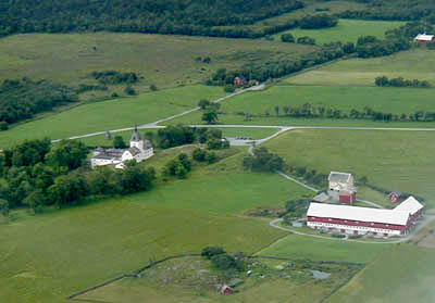 To the left, the Manor of Austrått; to the right The Austrått Farm. Bildet viser til venstre Austråttborgen i Ørland, og til høyre gårdseiendommen som historisk sett var knyttet til herresetet.